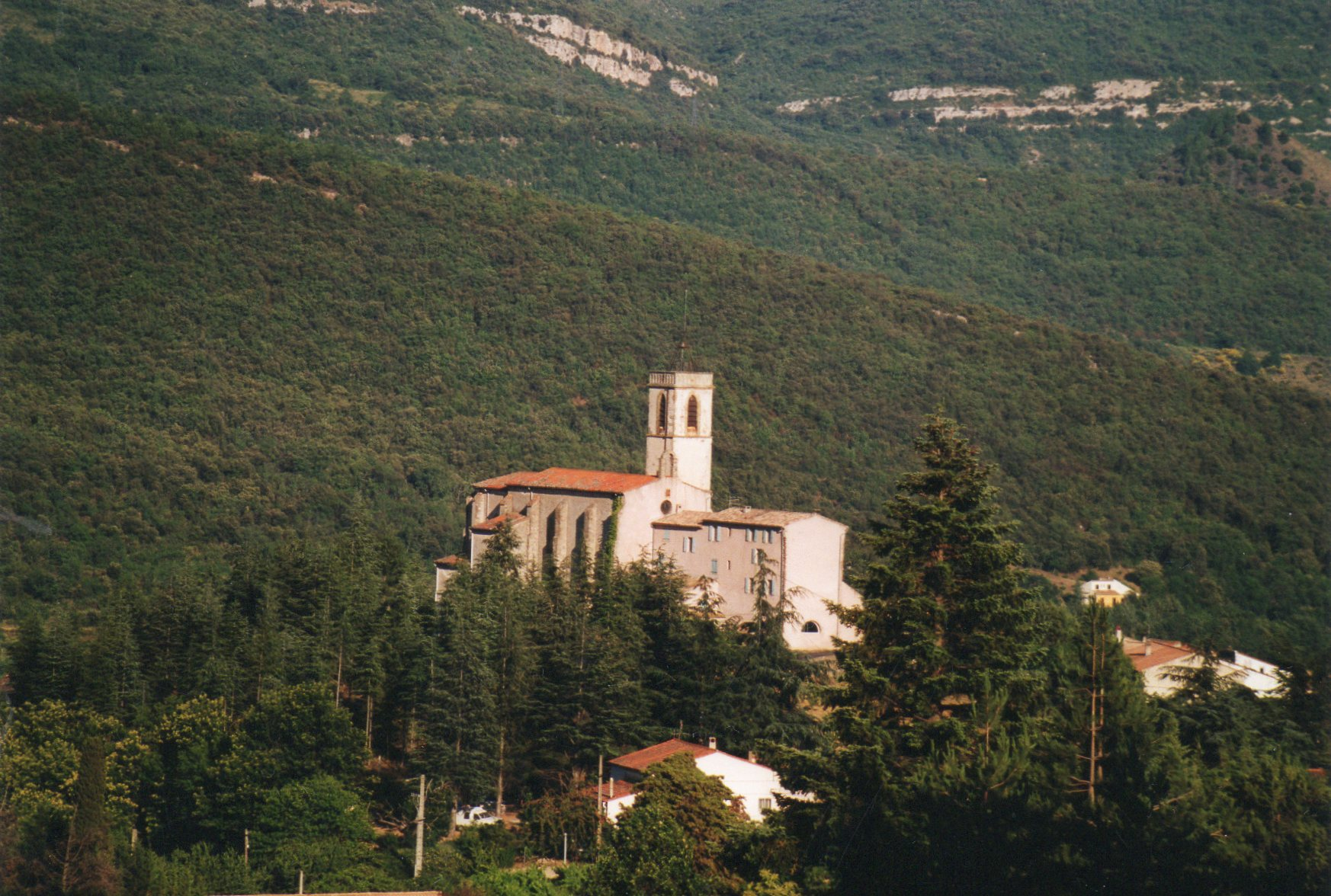 Eglise paroissiale de Saint Martin d'Ob commune du Bousquet d'Orb